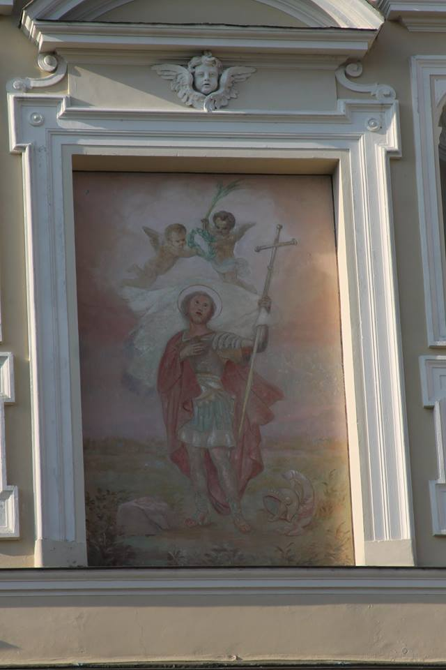 Statue de Saint Pierre sur la façade del l'eglise à Barbania (Piedmont)